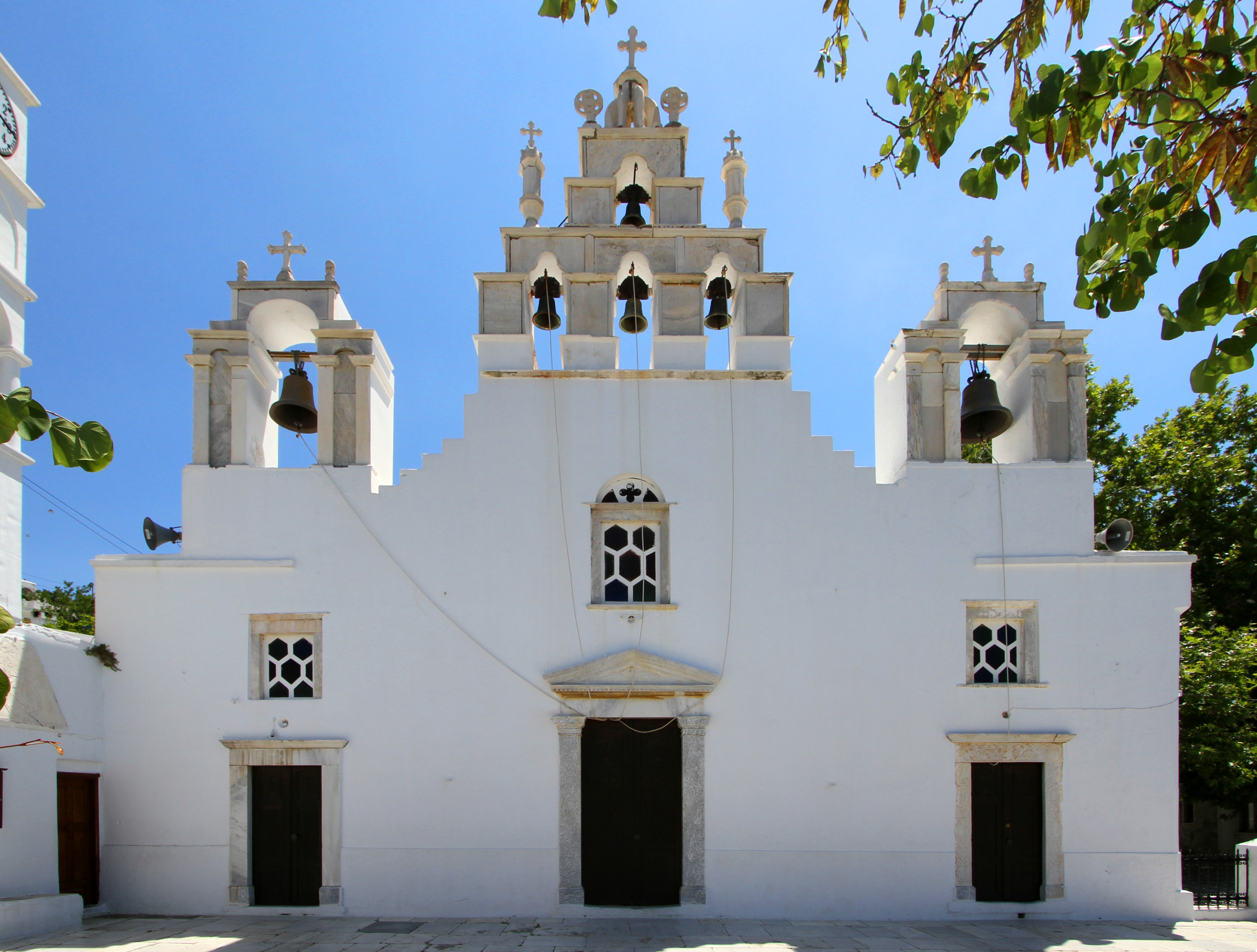 Filoti: Panagia Fioliotissa